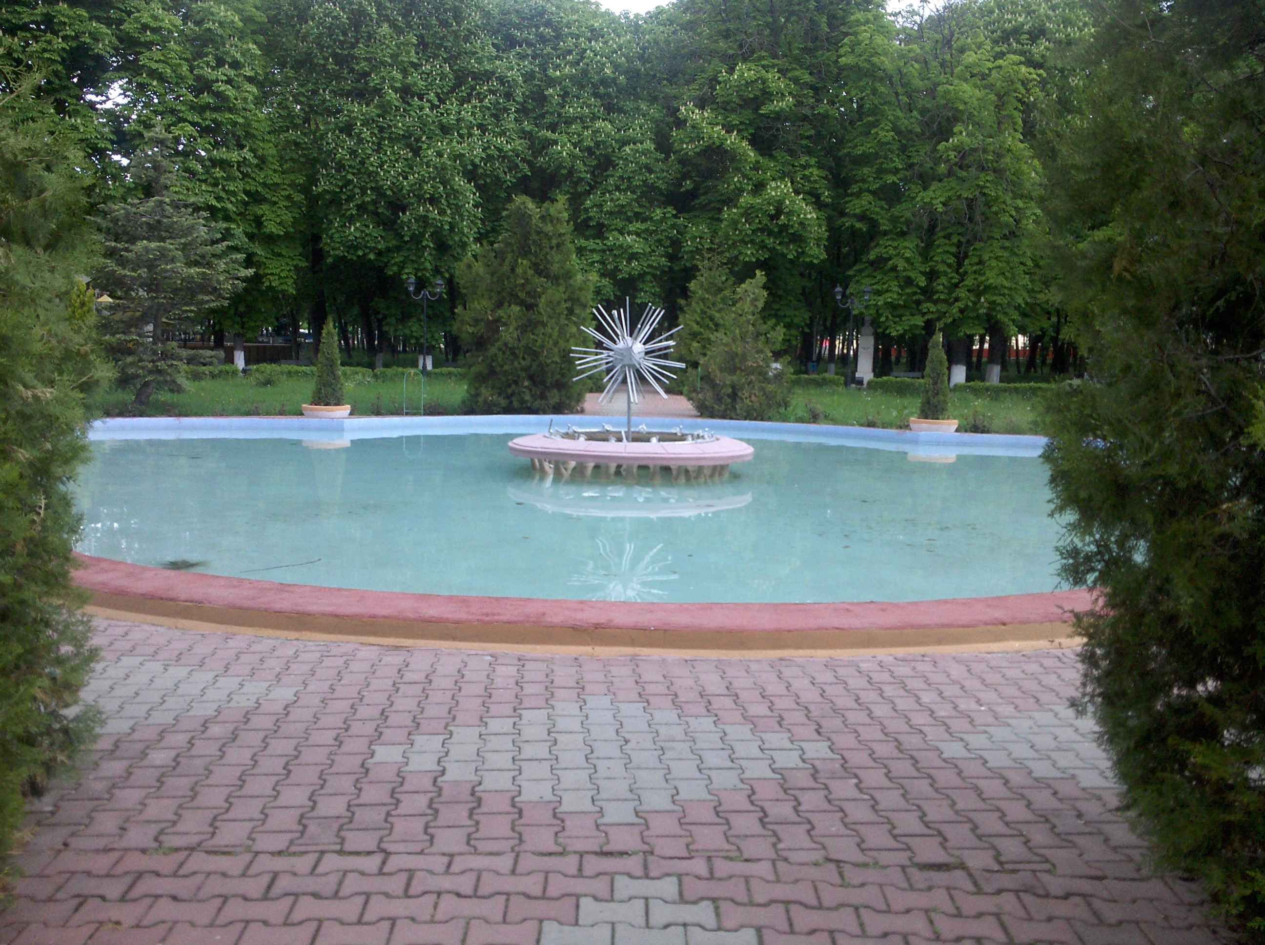 fuente en el parque de Roman